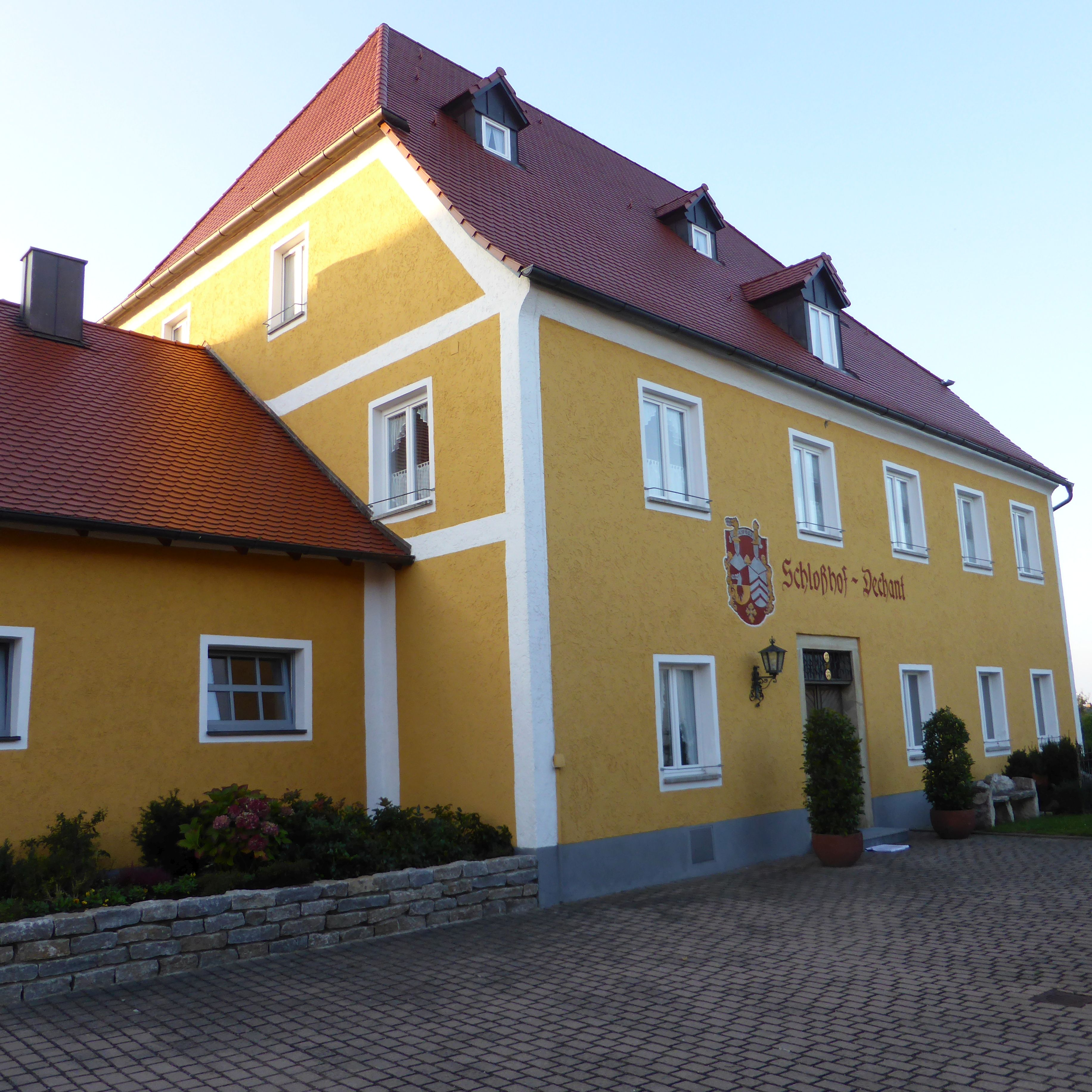 Hochdorf (Hofmarksschloss)